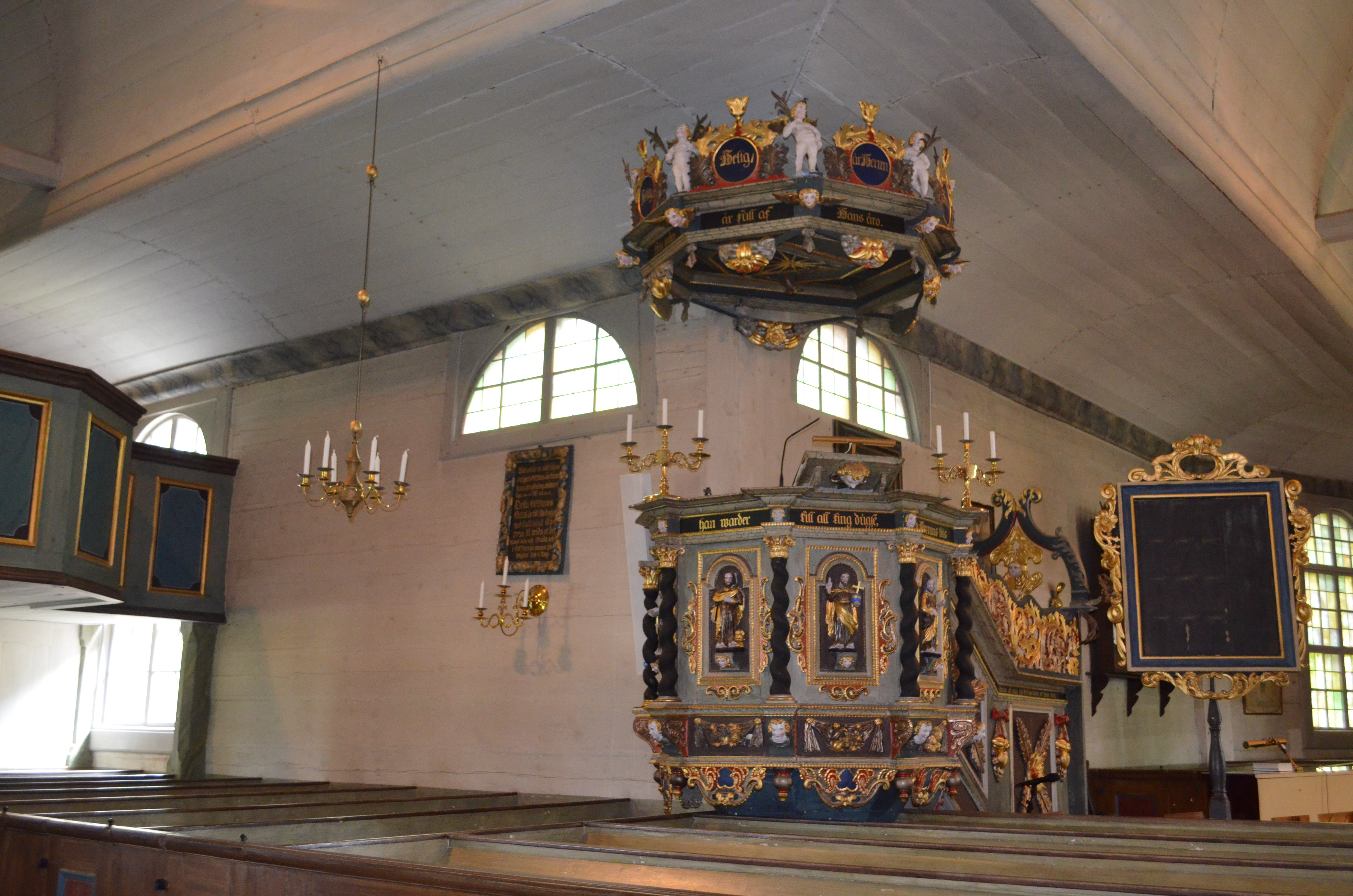 Visnums kyrka predikstolen 2017